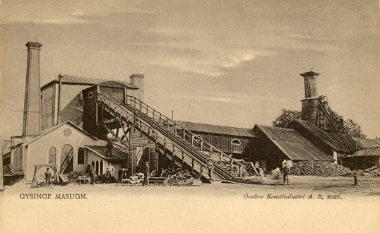 Gysinge, masugnen (nedlagd omkring 1905) Foto ca 1880-1900.